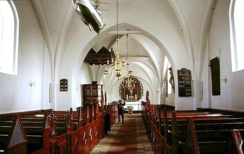 Volstrup Kirke i Danmark. Skibet set mod øst